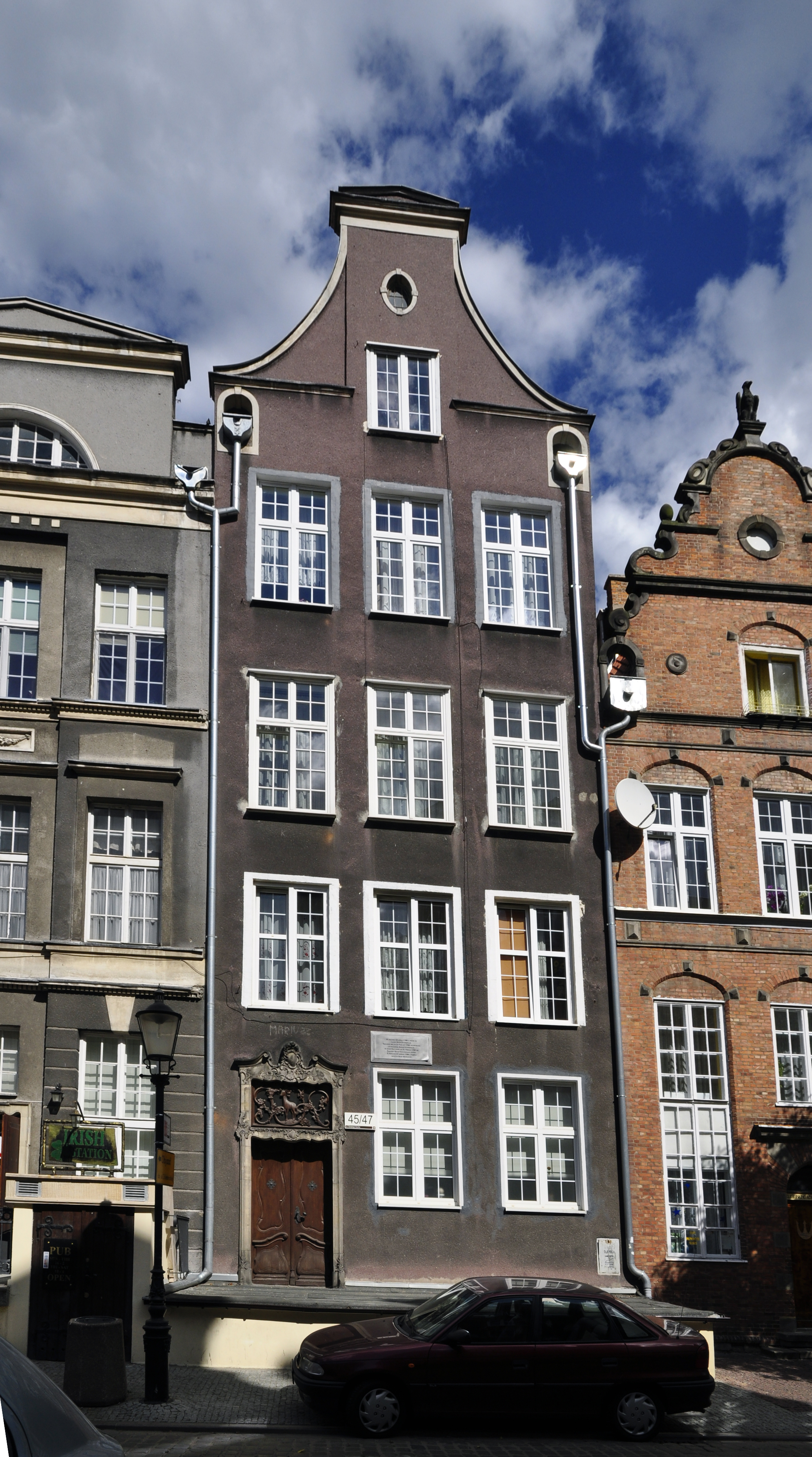 Kamienica ul. Świętego Ducha 45, Gdańsk